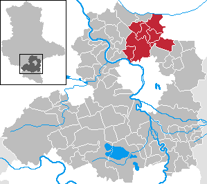 Verwaltungsgemeinschaft Götschetal-Petersberg in Sachsen-Anhalt - Saalekreis